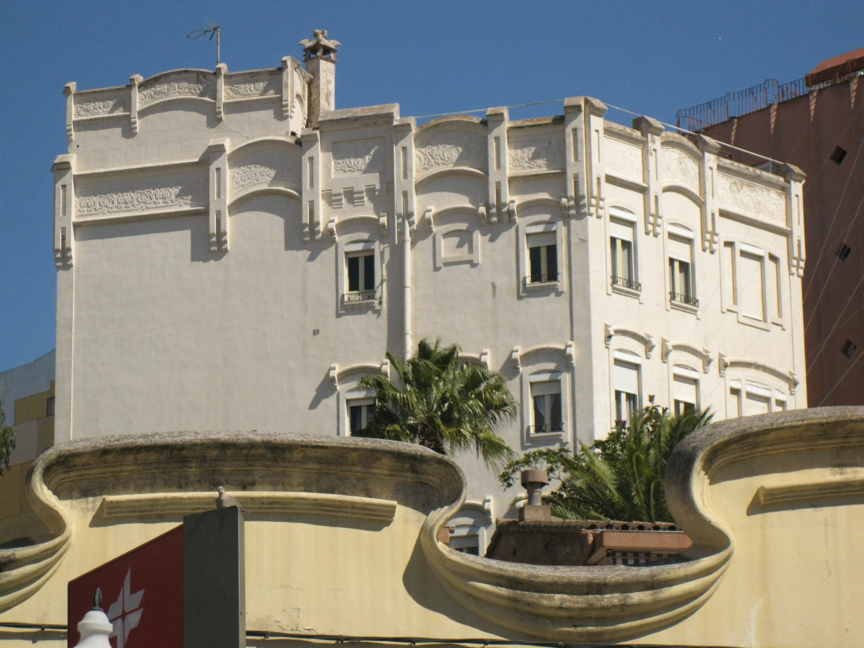 Casa Ripoll I (Tarragona)